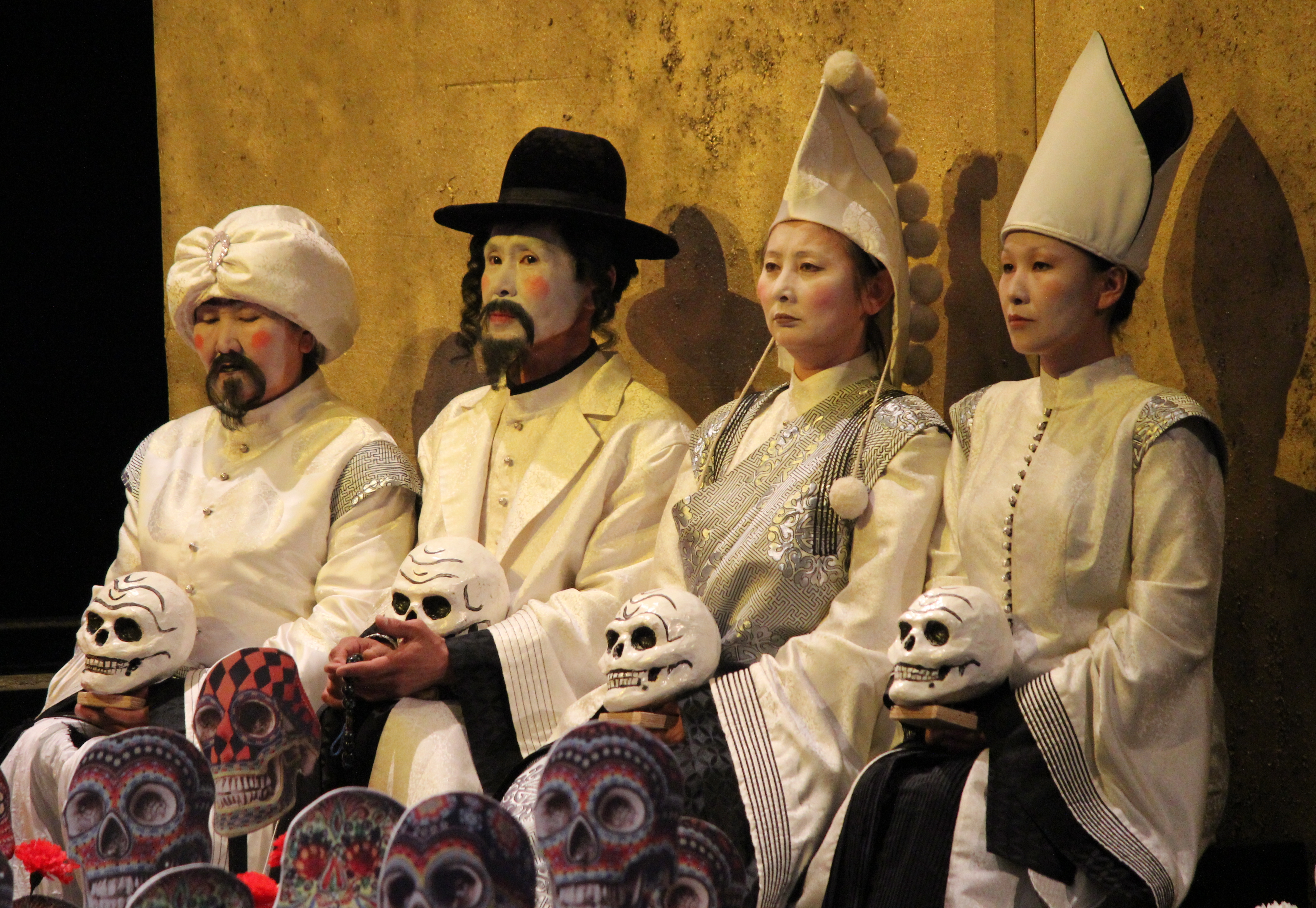 Спектакль "Принцесса Турандот" в Бурятском театре драмы в постановке Олега Юмова